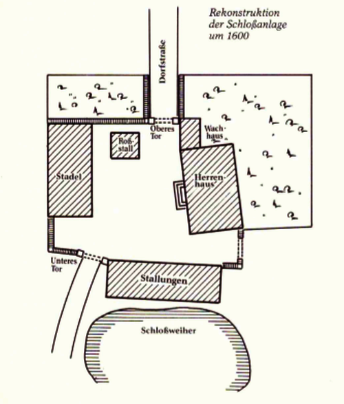 Lageskizze von Schloss Vorbach (um 1600)